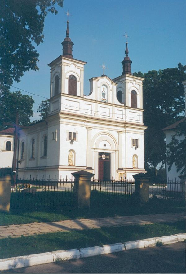 Zdjęcie przedstawia kościół w Dubience.